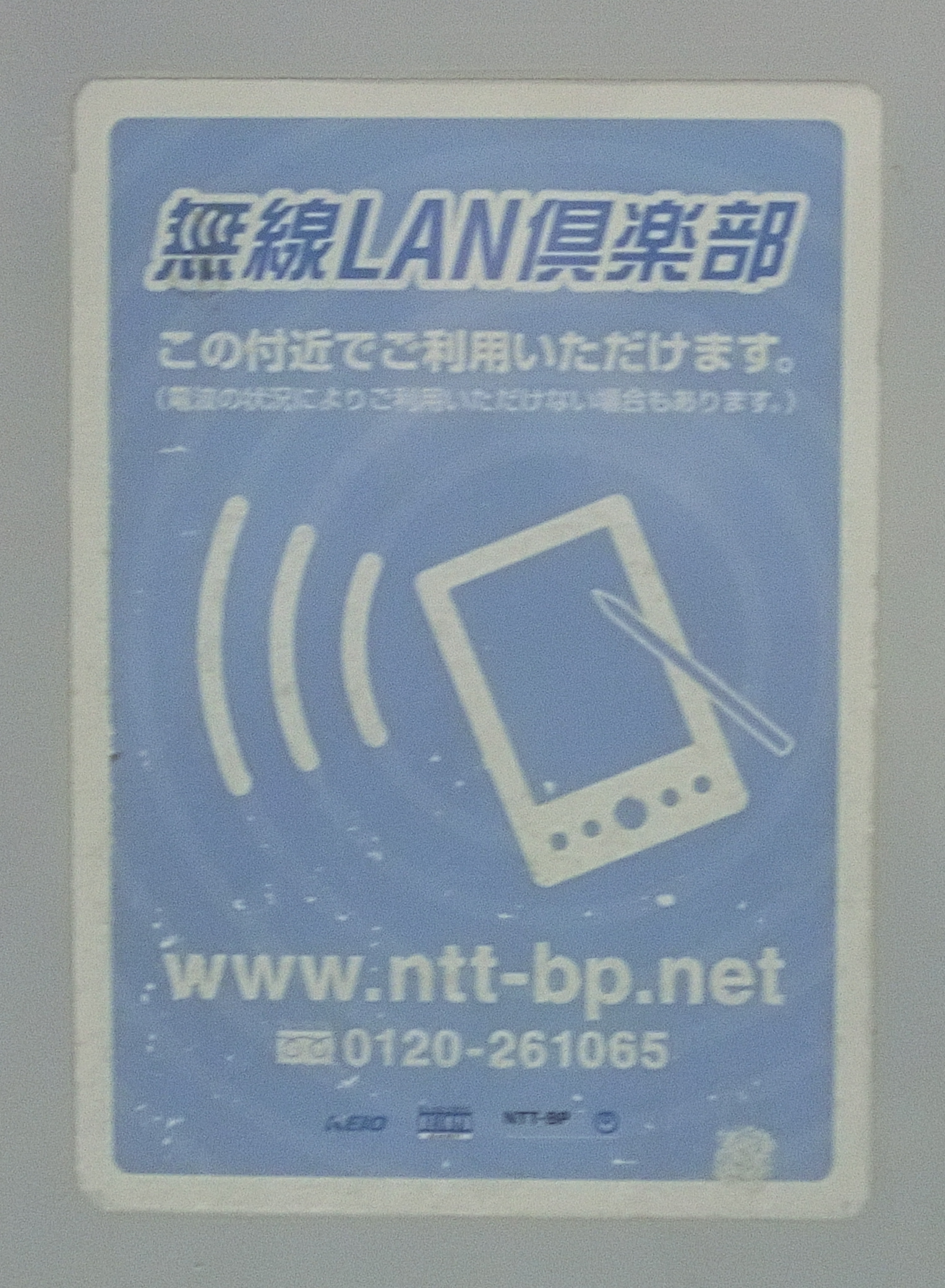 無線LAN倶楽部エリア表示ステッカー